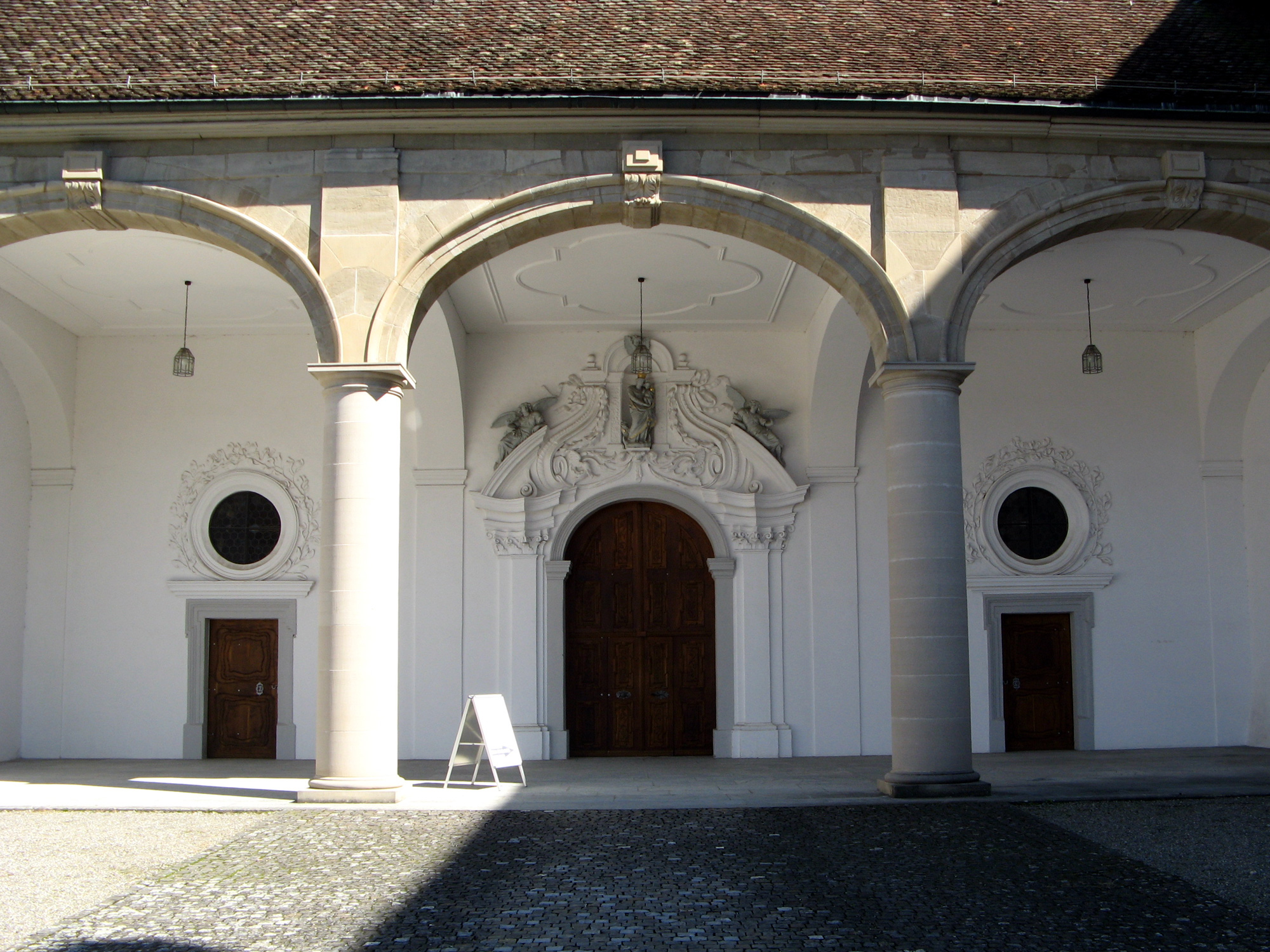 Hauptportal des Klosters Muri